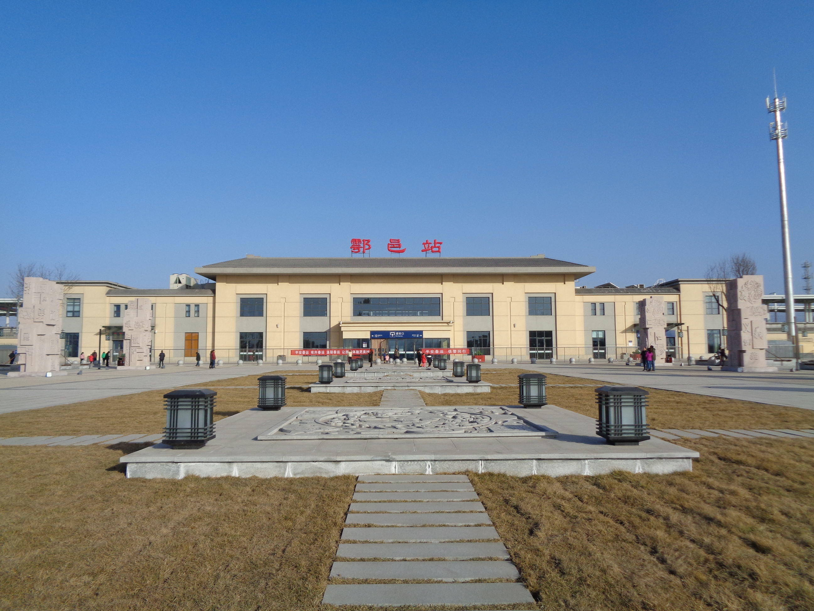 西安市鄠邑区秦渡镇鄠邑站